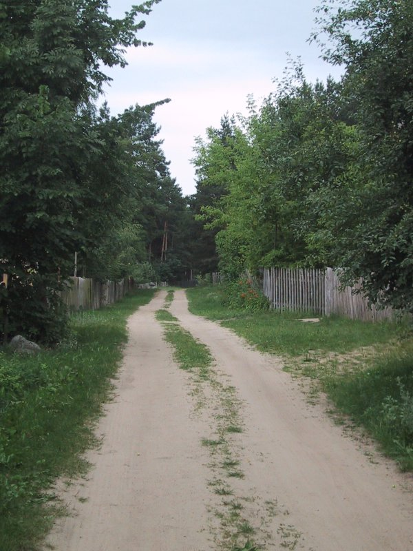 Droga we wsi Kruzy (woj. podlaskie)